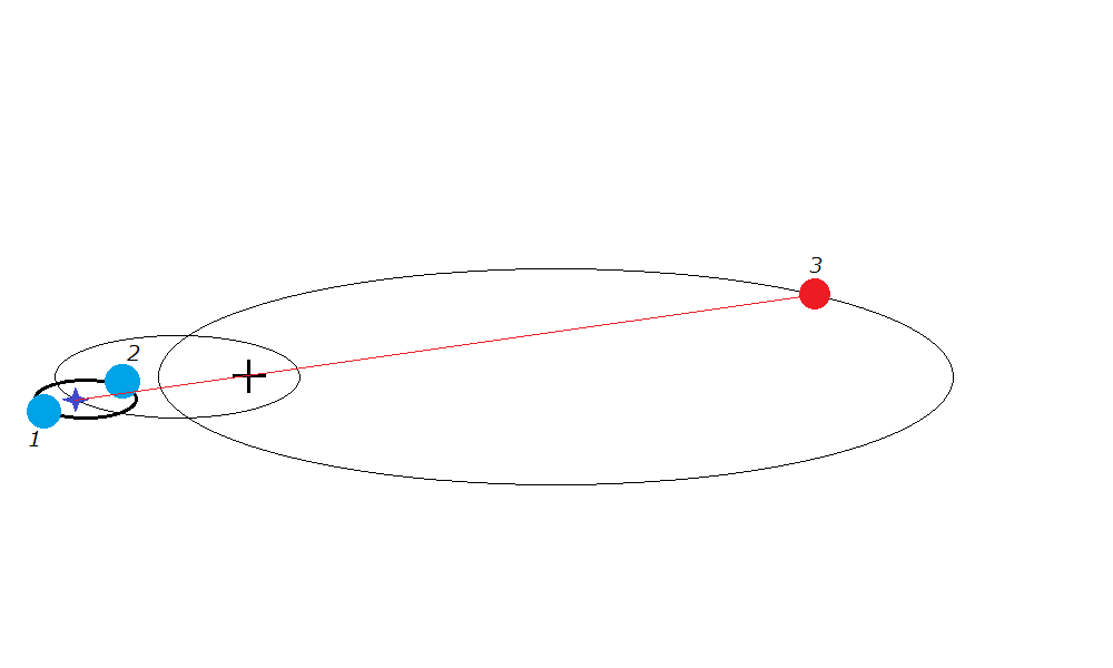 This picture show the model of the triple hierarchical system, in which the binary system (1-2) rotates around the common barycenter (bold cross) with the third body (3), which is much further from the barycenter than binary. Also it is in the diametrically-opposite point of orbit.